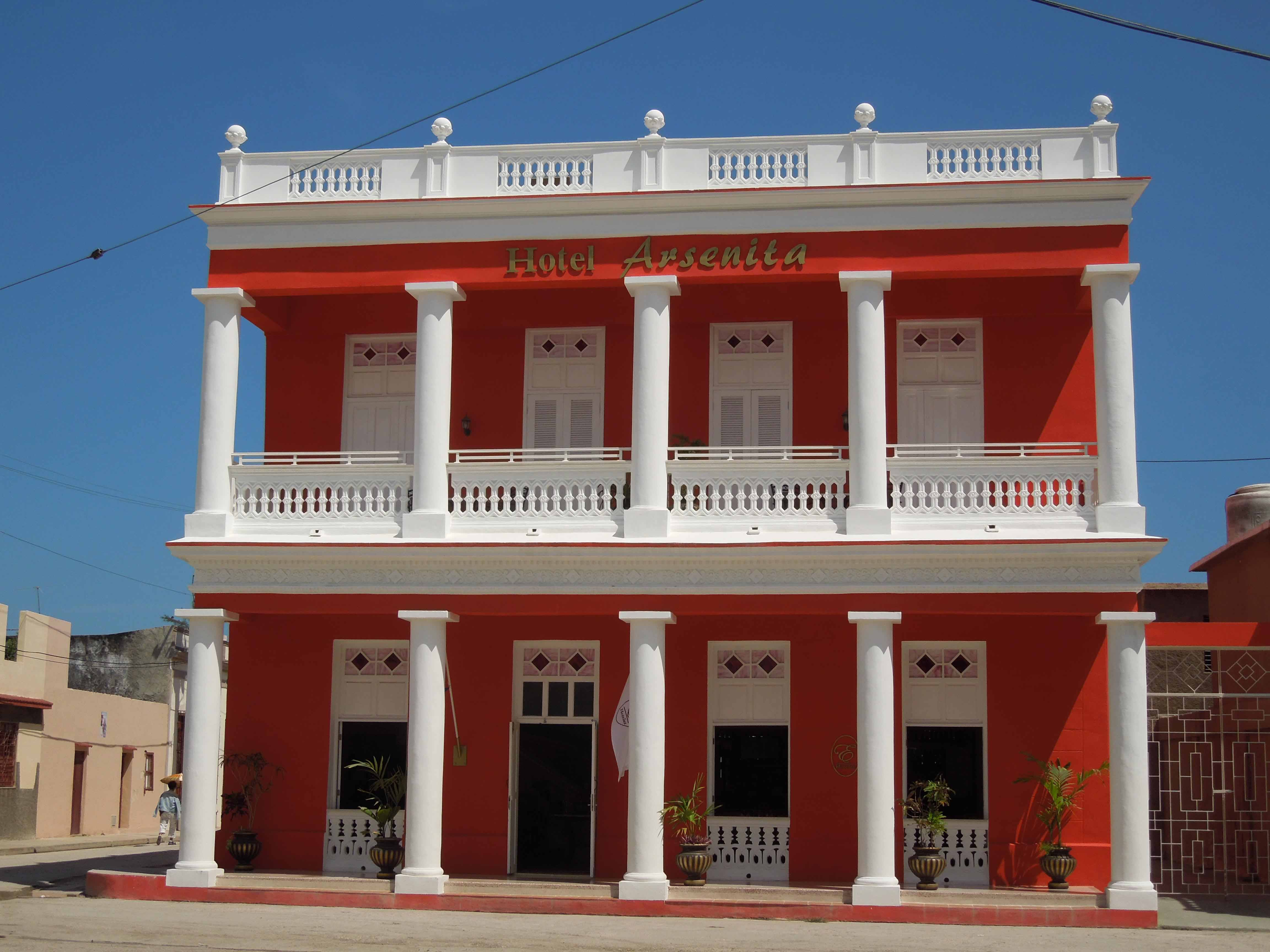 Antiguamente casa de Doña Arsenita. Hoy Hotel Arsenita.